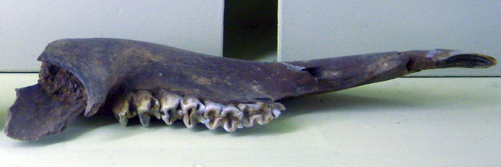 Macropus titan jaw, Naturkunde Museum, Berlin.